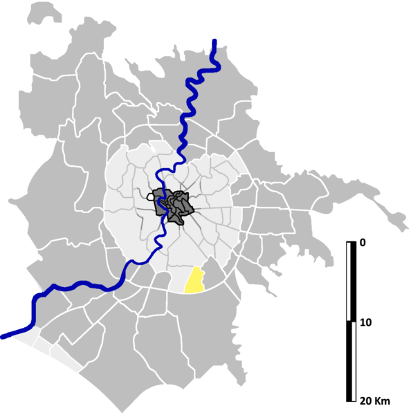 Cecchignola